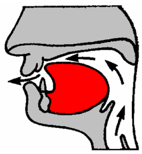 Beschreibung: alveolarer Laut in der Phonetik Quelle: selbst erstellt --Immanuel Giel 10:12, 22. Mär 2005 (CET) (für die GNU FDL)